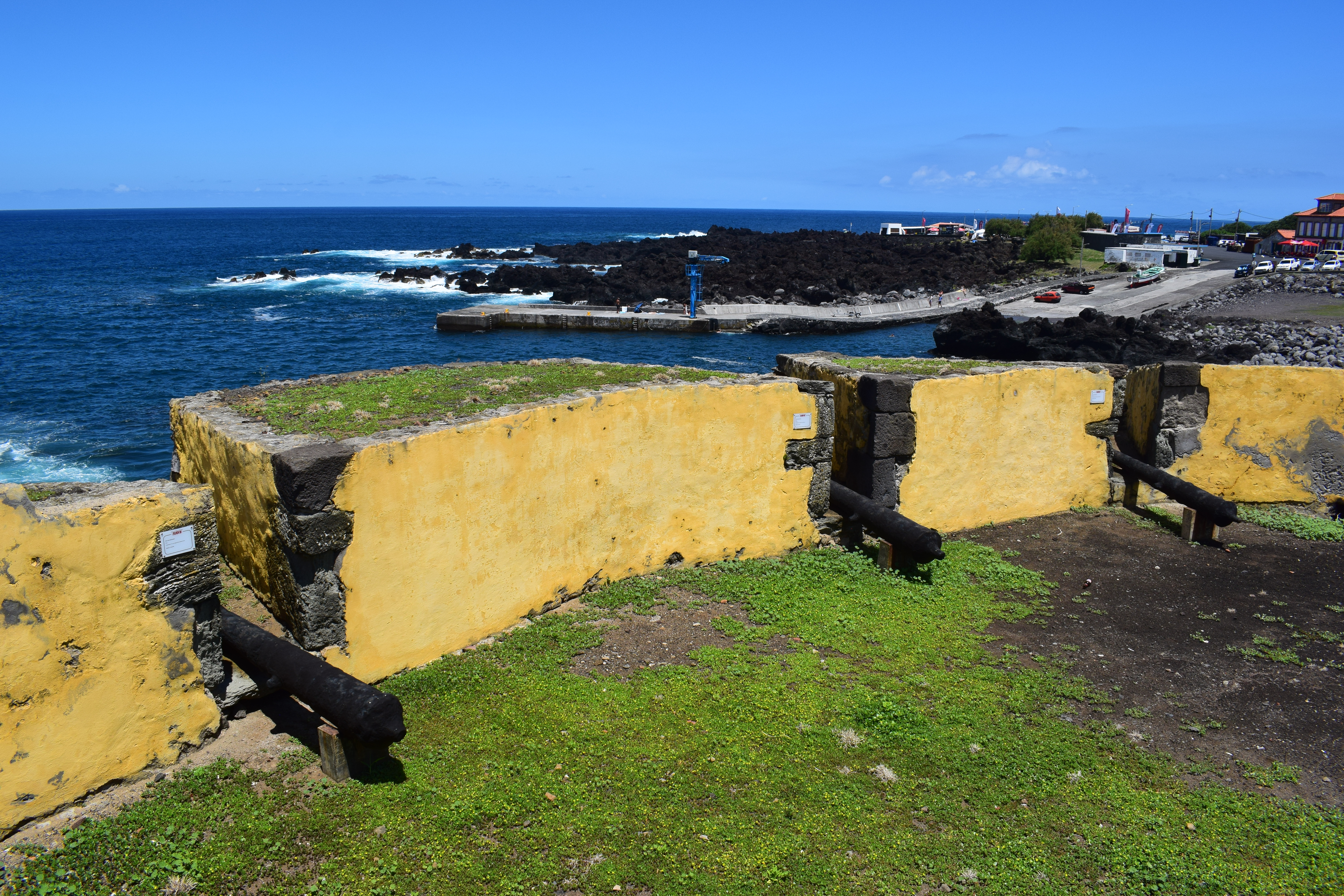 Das Forte de São Pedro, Biscoitos, Terceira, Azoren, Portugal.